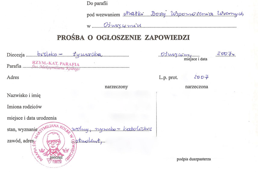 Formularz prośby o ogłoszenie zapowiedzi w parafii narzeczonego